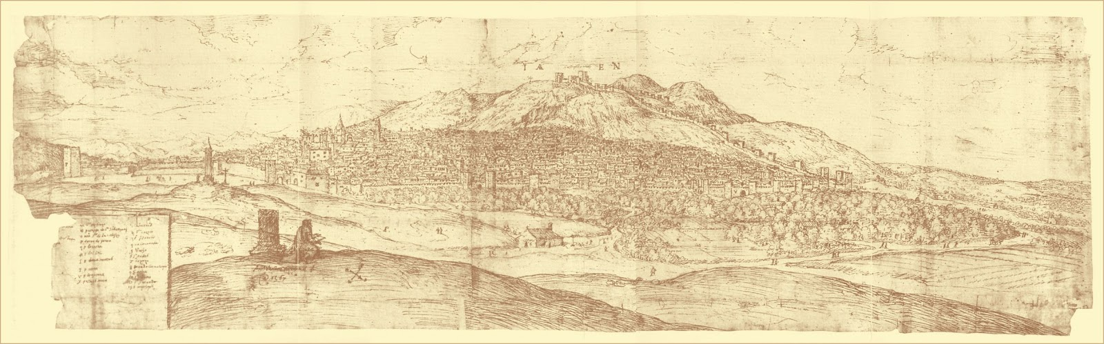 Vista de Jaén (España) realizada en 1567 por Anton van der Wyngaerde.